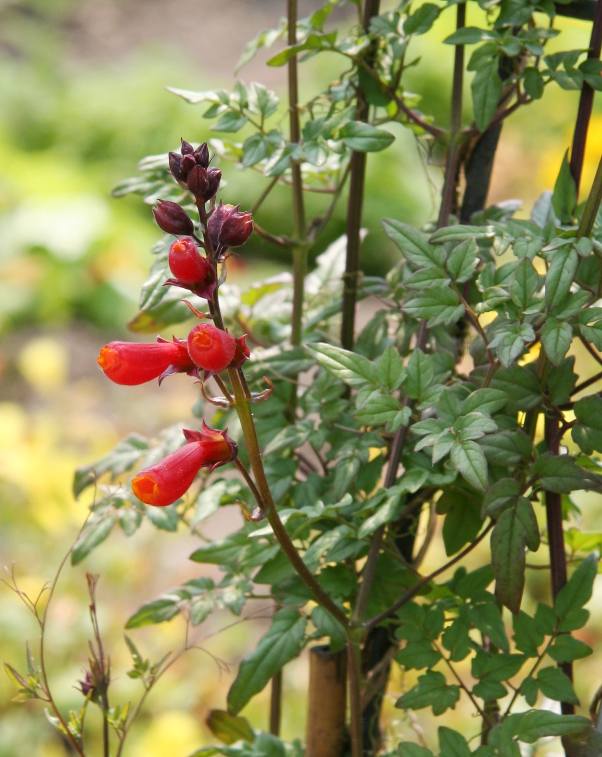 Eccremocarpus scaber im Botanischen Garten Dresden